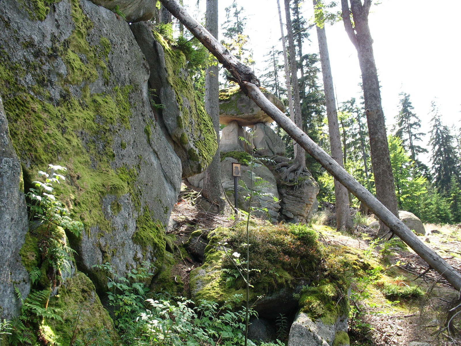 Medvědí stezka na Šumavě